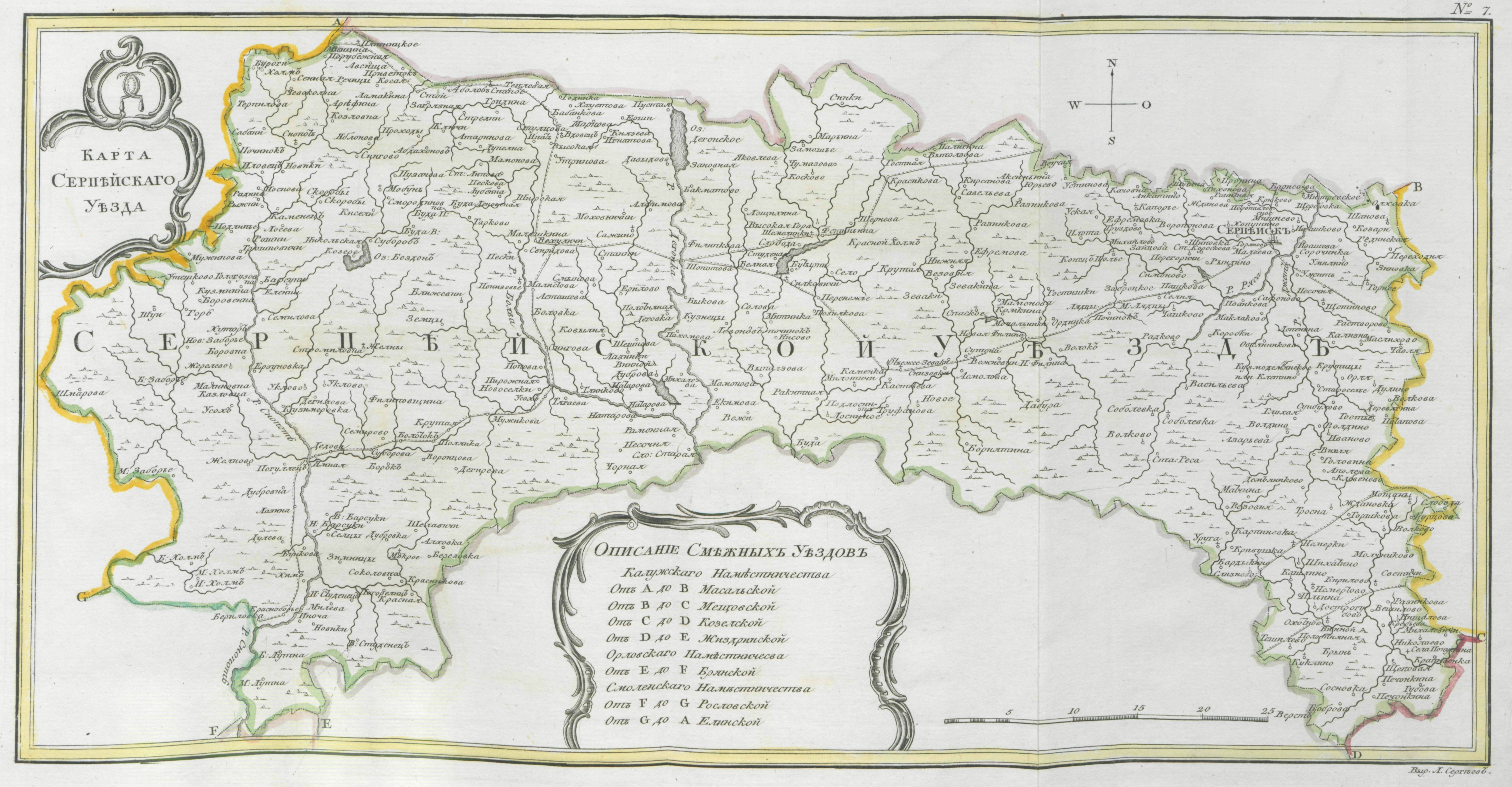 Карта Серпейского уезда из атласа 1792 г.